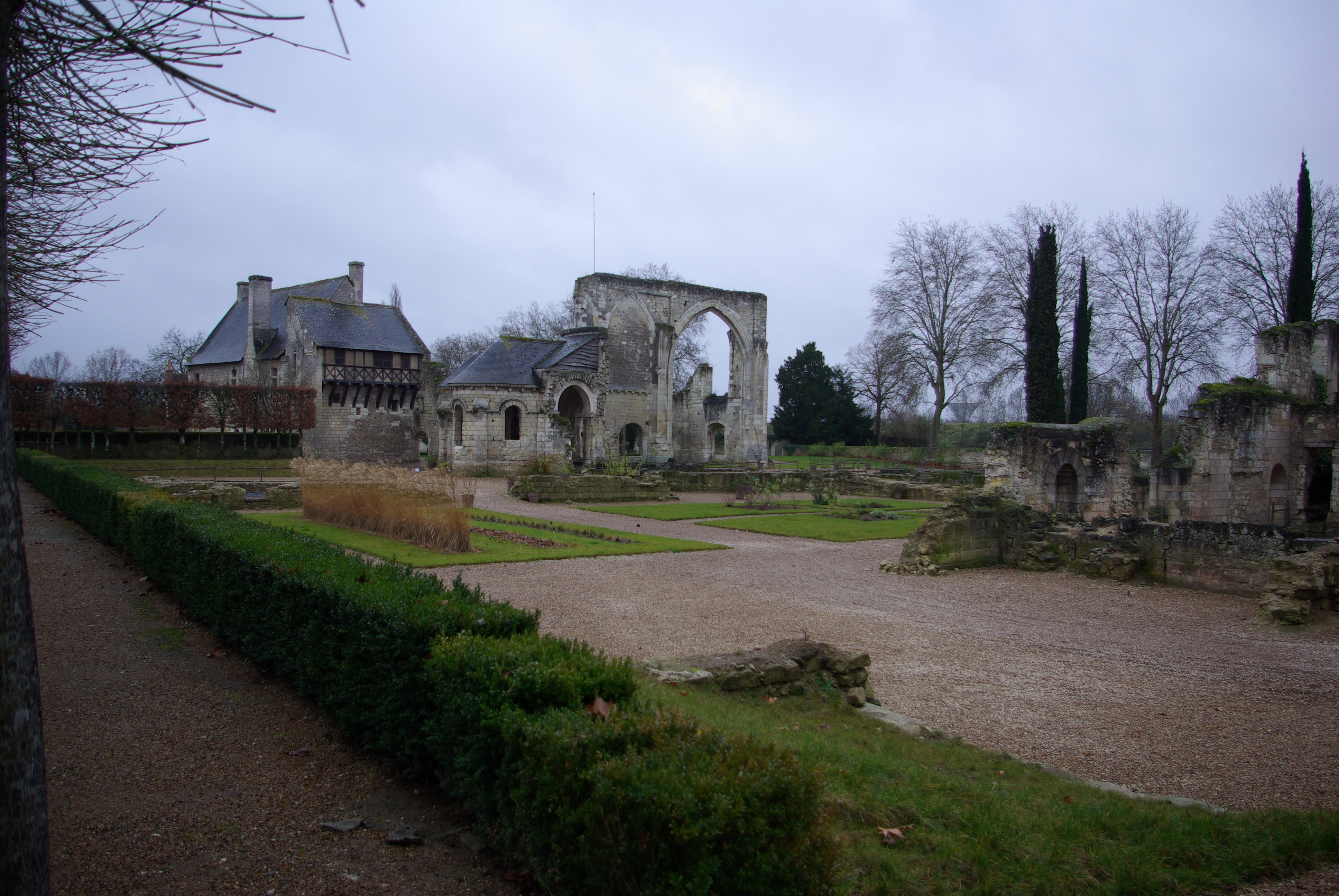 Prieuré de Saint-Cosme. De gauche à droite : le logis du prieur, les ruines de l'église détruite en 1944 par un bombardement, les ruines de l'infirmerie du XIIe siècle. A gauche contre la haie de buis, les fondations de l'ancienne église. Passer la souris sur l'image pour faire apparaître des encadrés délimitant ces quatre unités de construction.